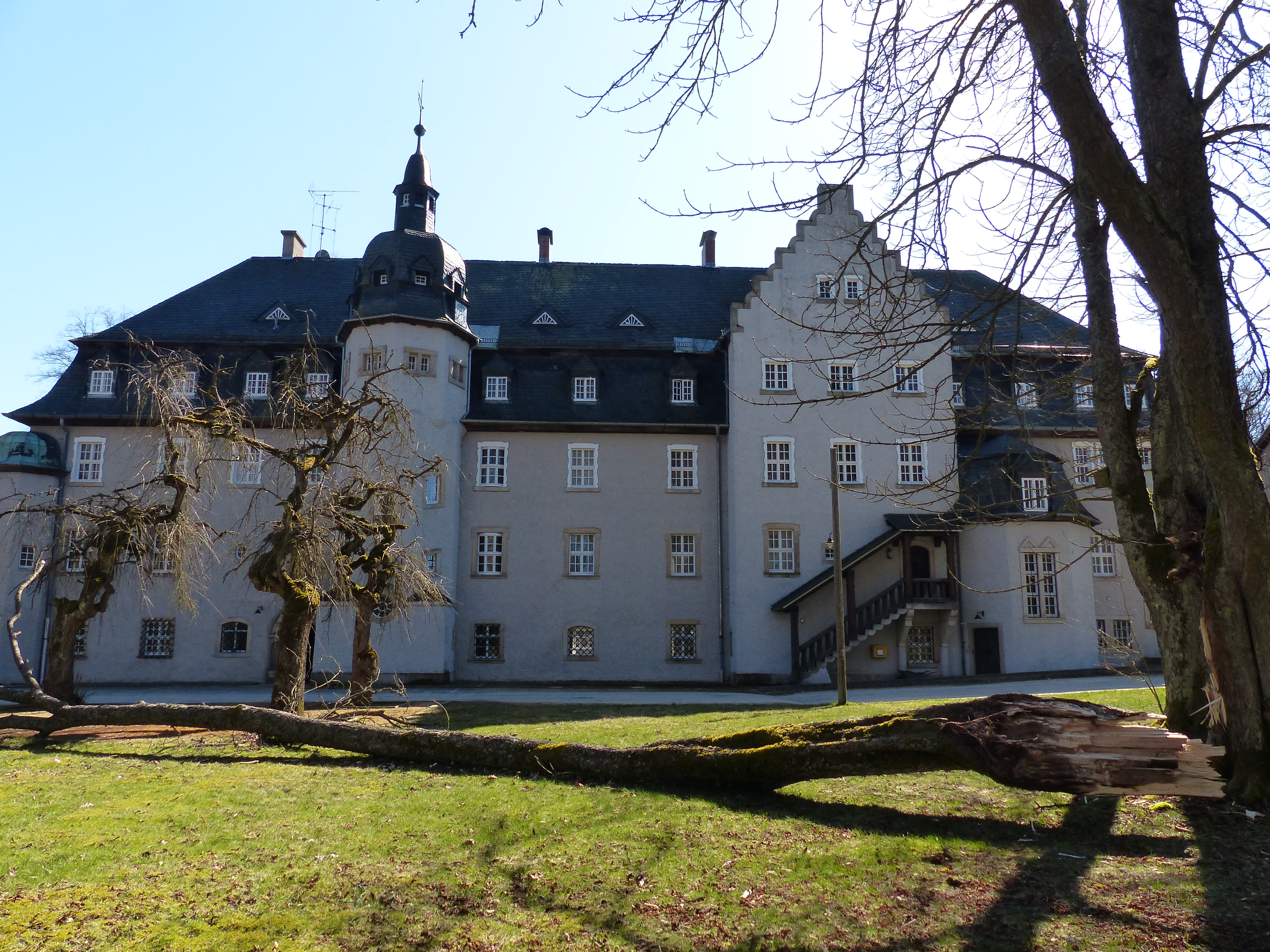 Bauwerke und Baudenkmäler in Schönwald